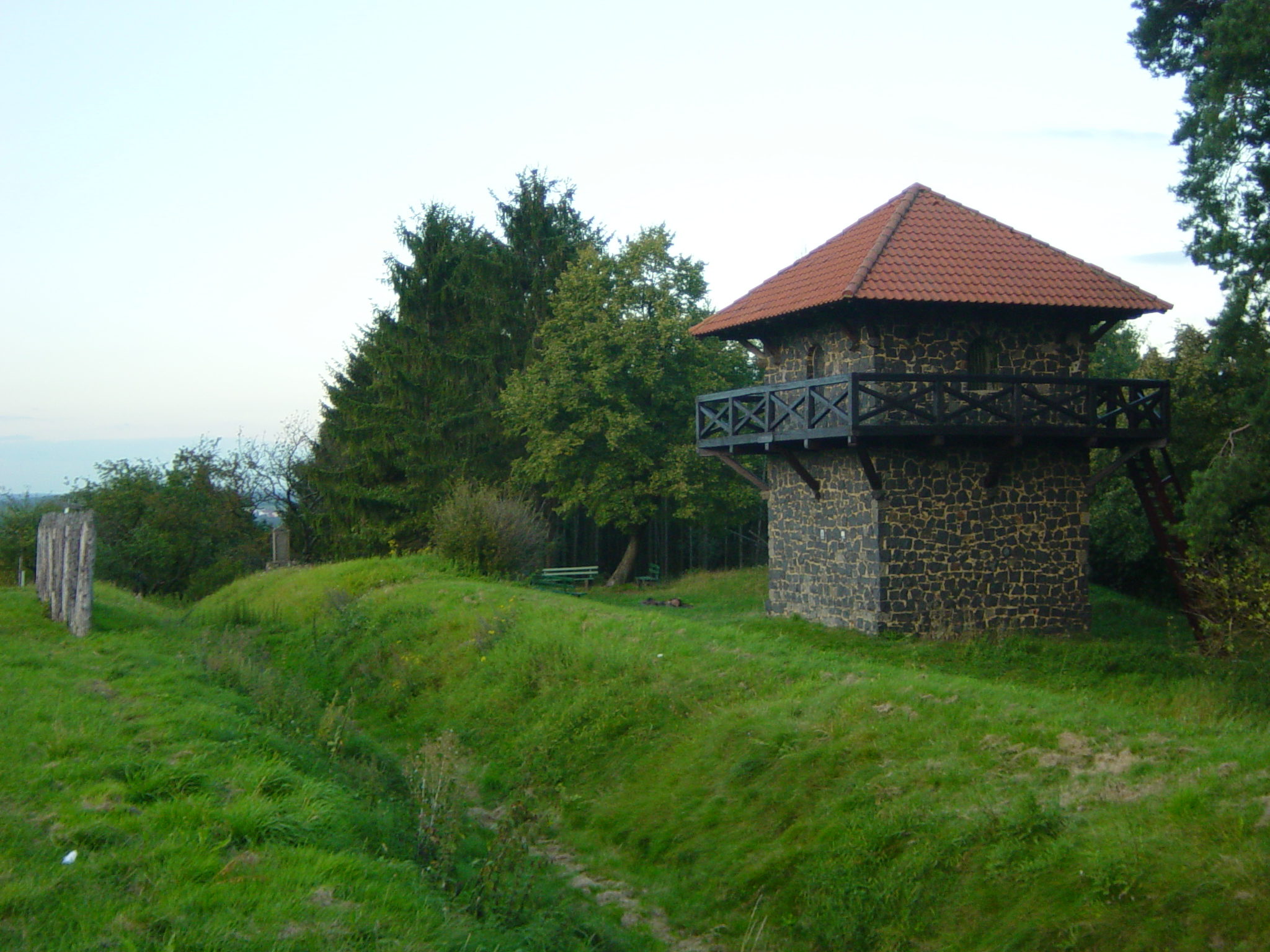 Römerturm bei Pohlheim, Obergermanischer Limes